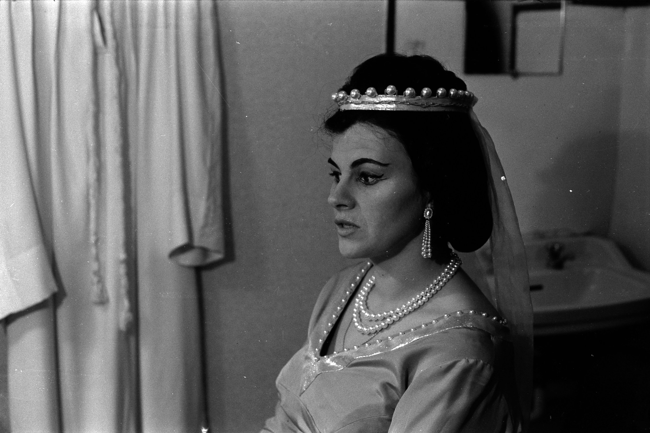 intérieur du théâtre du Capitole. Le 15 novembre 1967. Plan en buste de profil de la chanteuse Vioria Cortez, en tenue de scène dans sa loge.